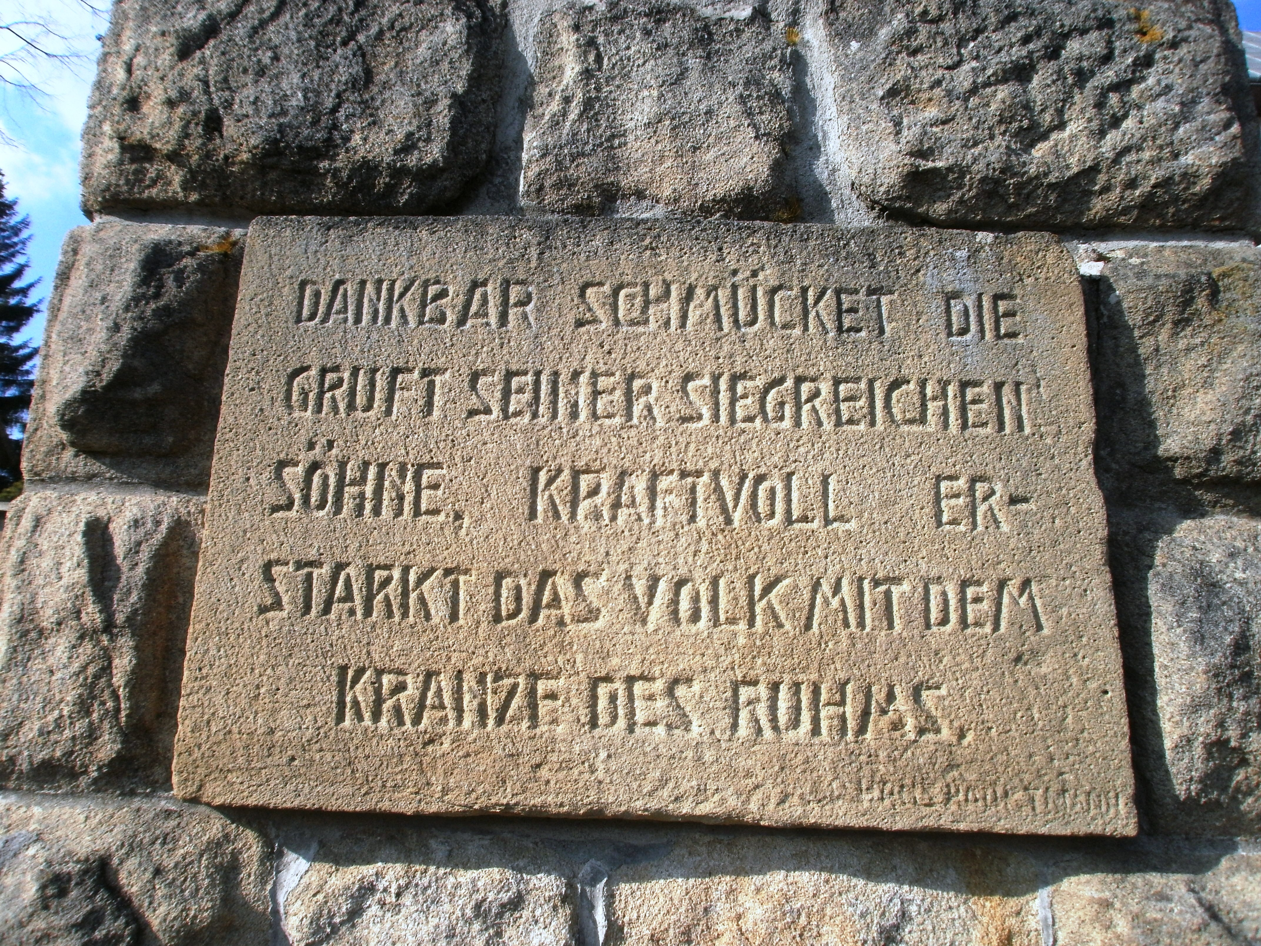 Desznica, cerkiew gr.-kat. p.w. św. Dymitra, ob. kościół rzym.-kat. p.w. Podniesienia Krzyża, 1790